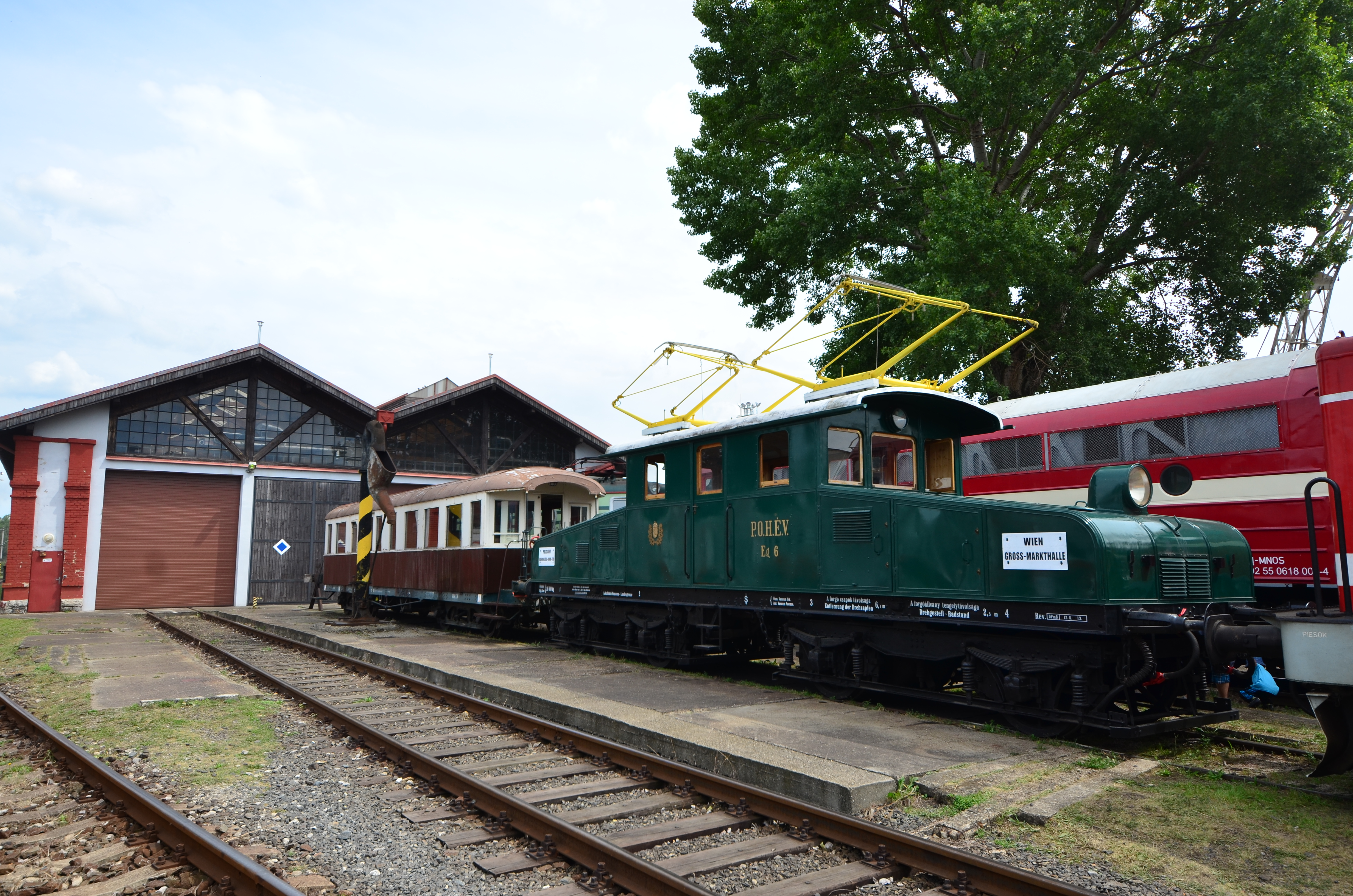 2016: Diaľkový vlak Viedenskej električky po 81 rokoch opäť v Bratislave, na Rendezi